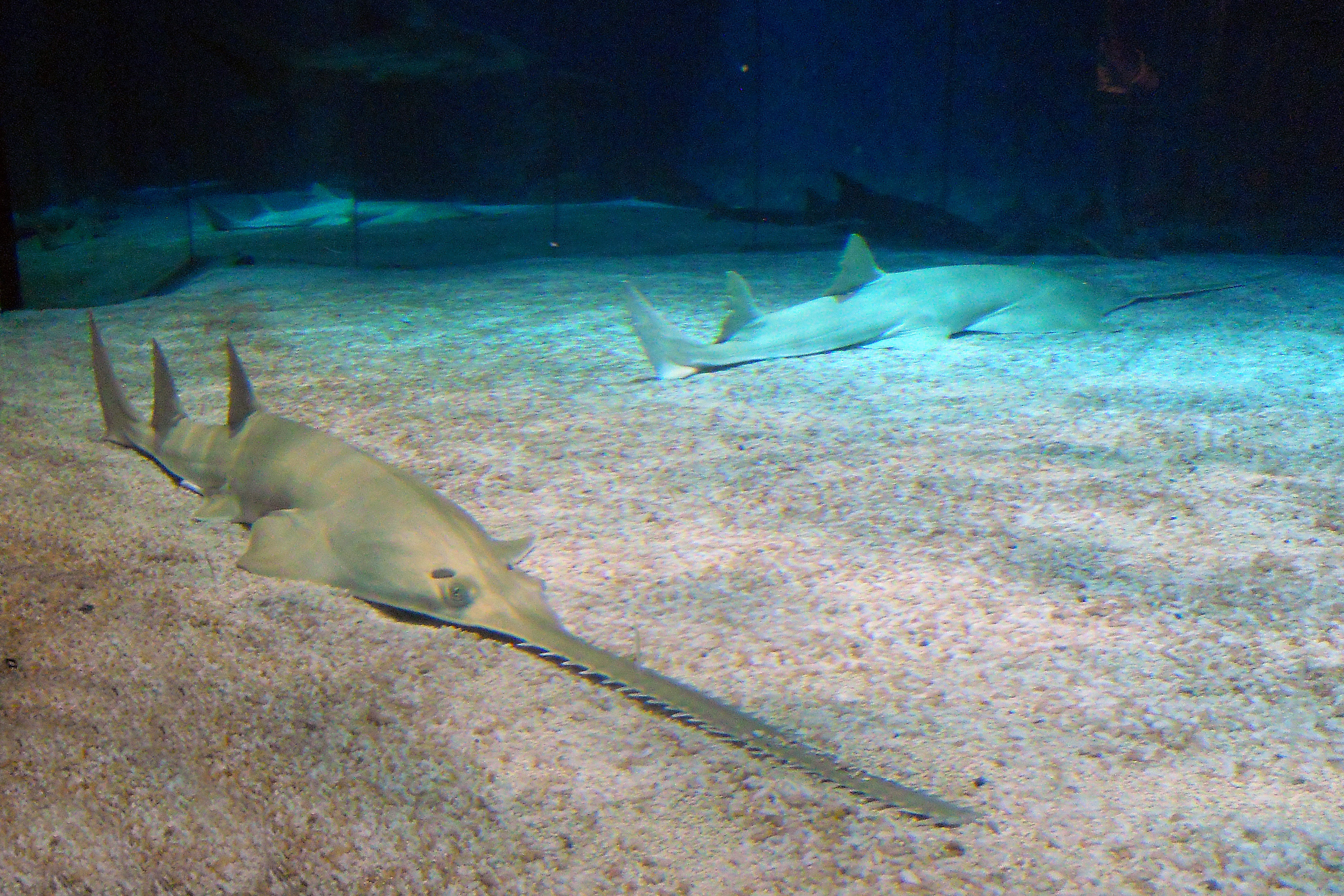 Pesci Sega fotografati presso l'Acquario di Genova - febbraio 2013